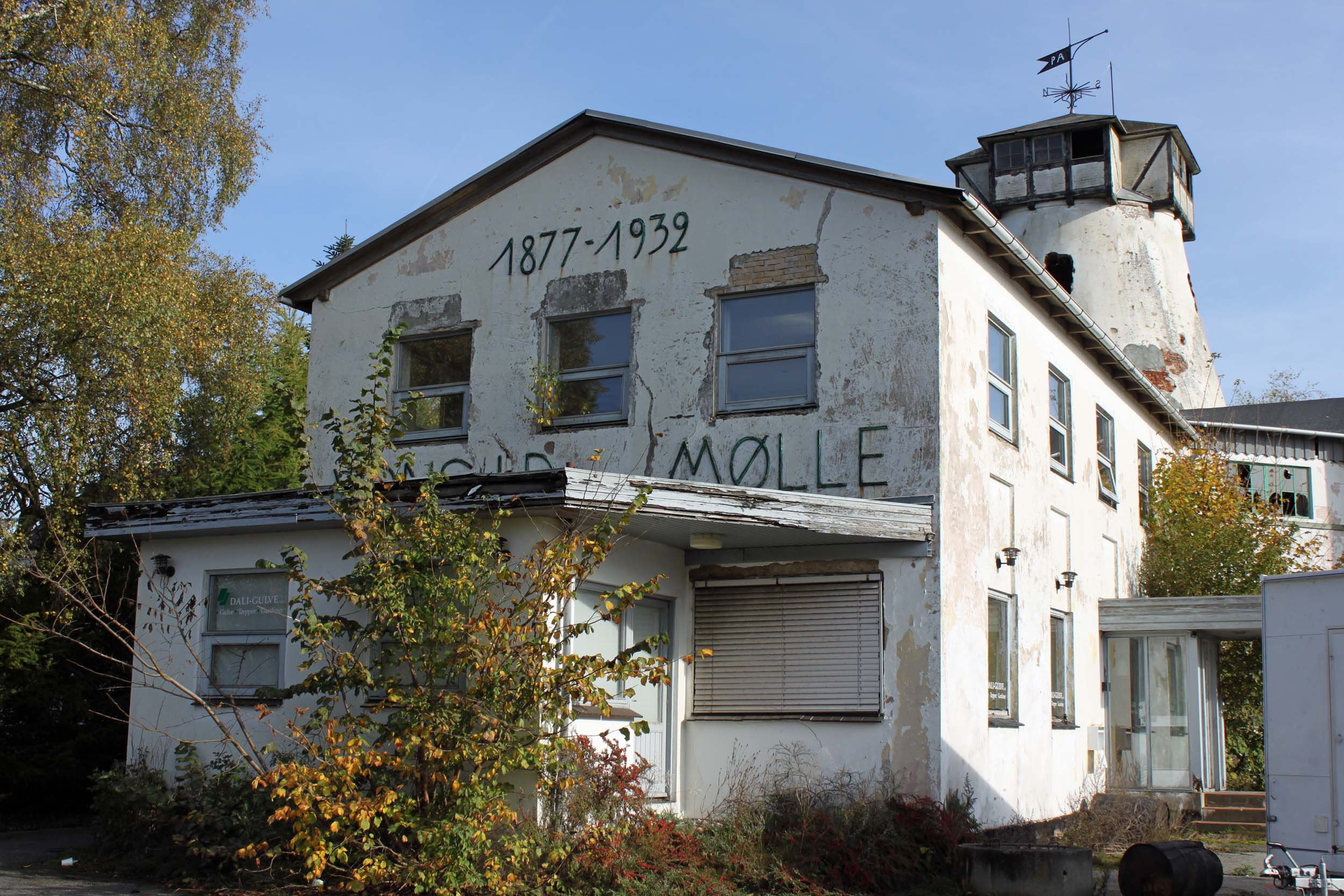 Vonsild Mølle, som den tog sig ud i 2013.